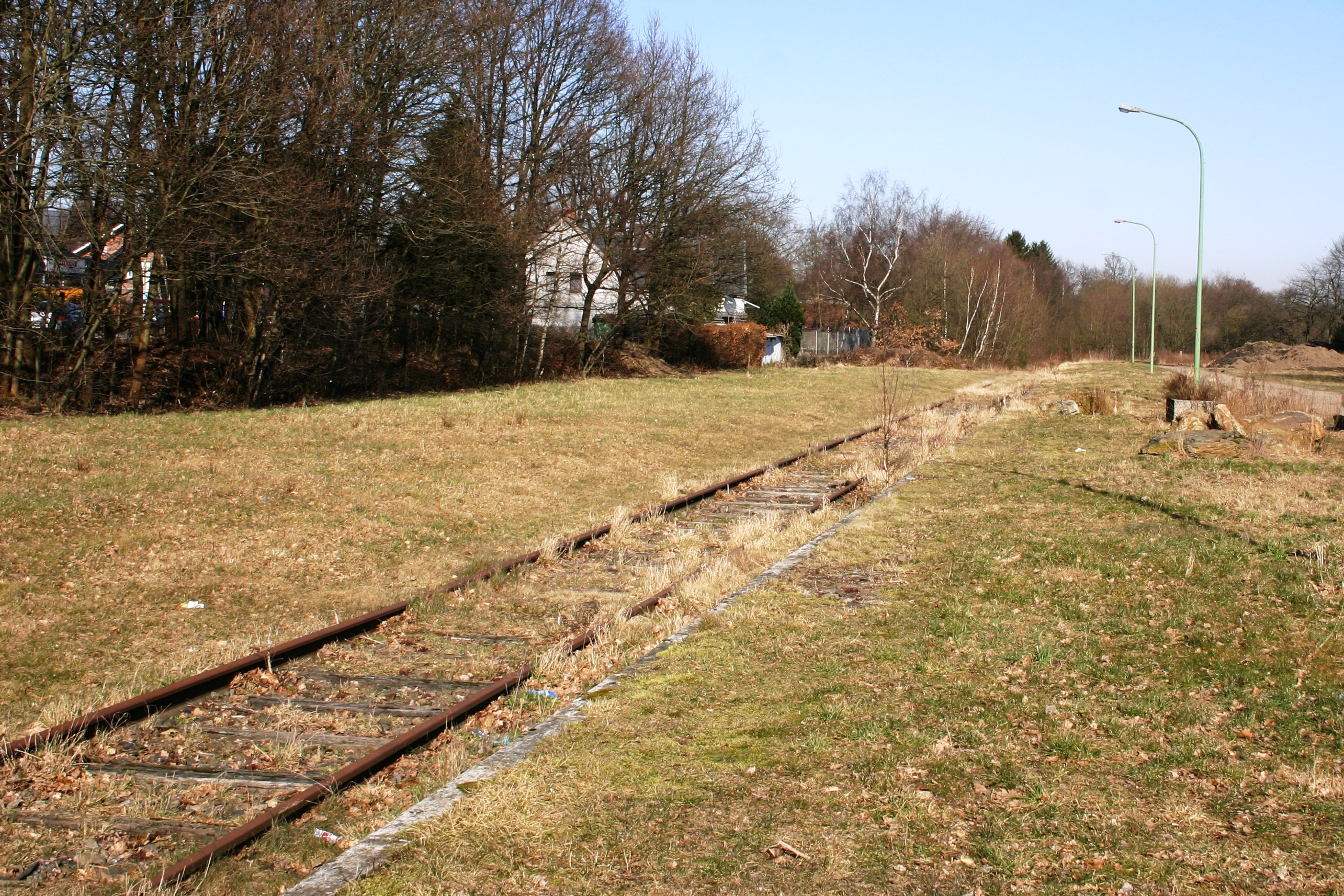 Vennbunn Gleiser an der Gare Roetgen Directioun Raeren.